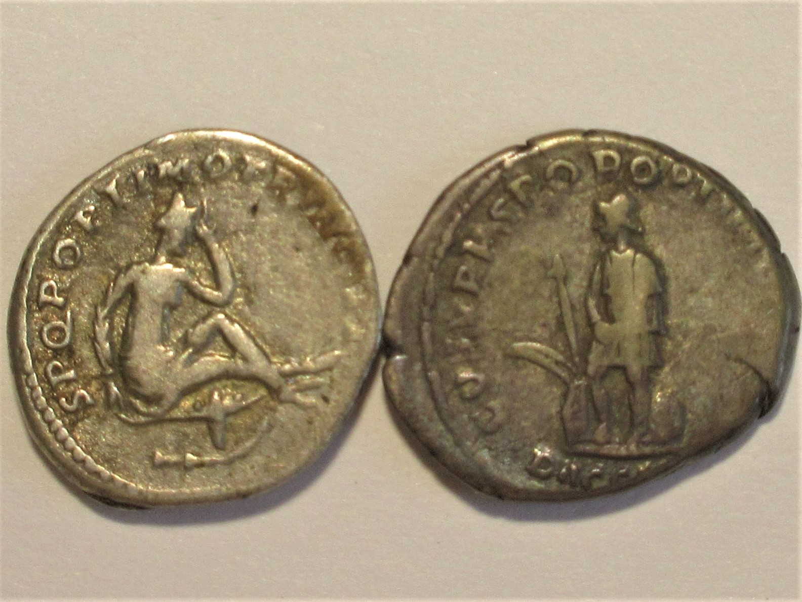 zwei Denarrückseiten des Trajan mit Dakern und ihren Waffen, Kampmann 27.61.4 und 27.32.3